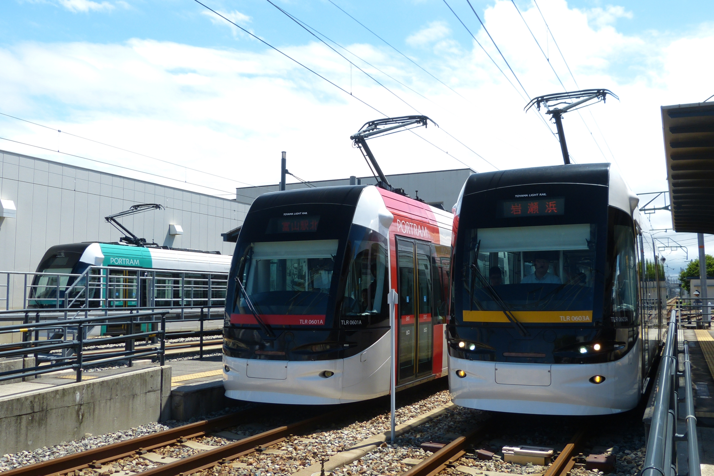 富山ライトレール TRL0605、TRL0601、TRL0603。城川原駅にて2012年8月14日撮影。